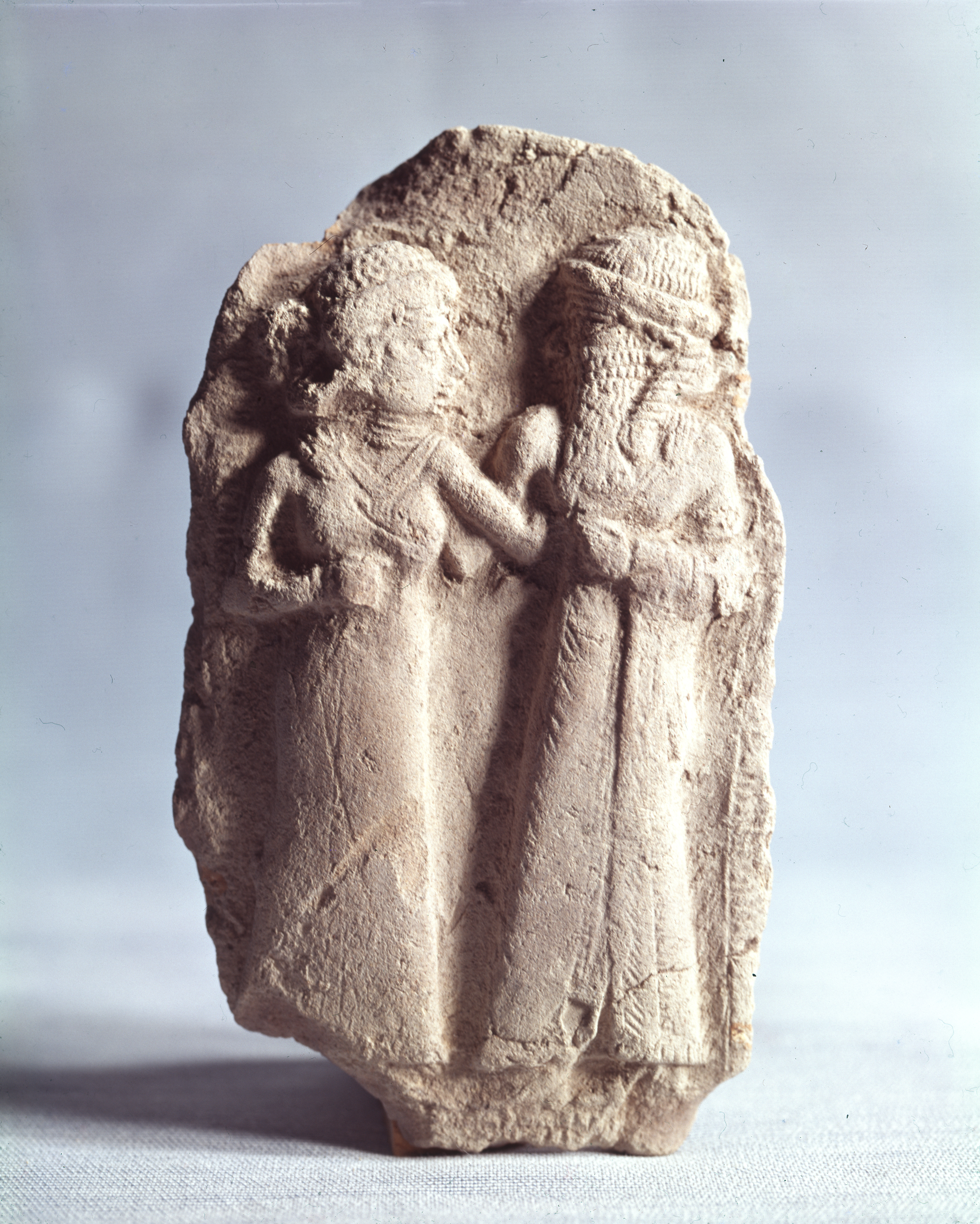 Terre cuite de Tello